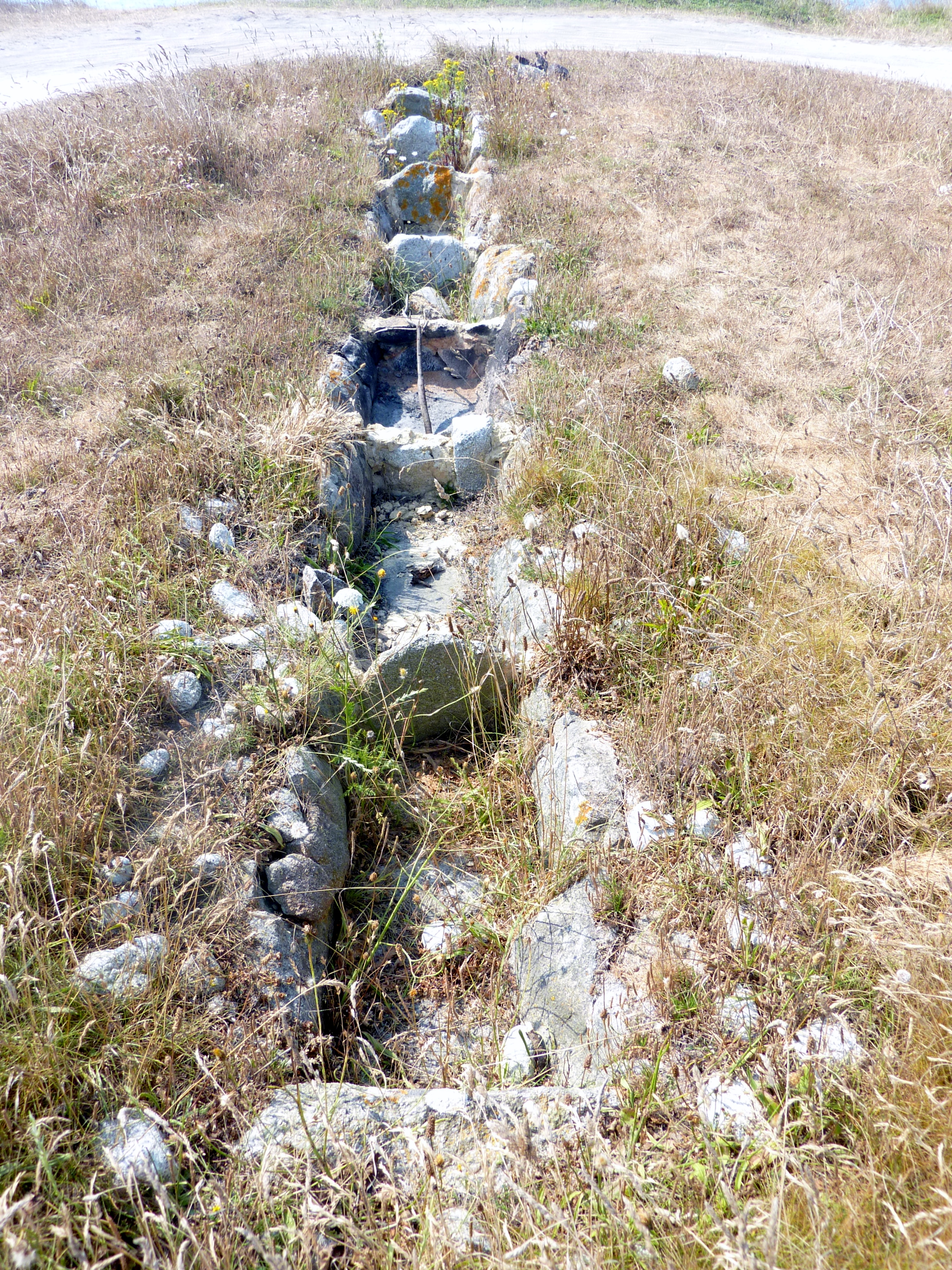 Plouescat : fosse à goémon